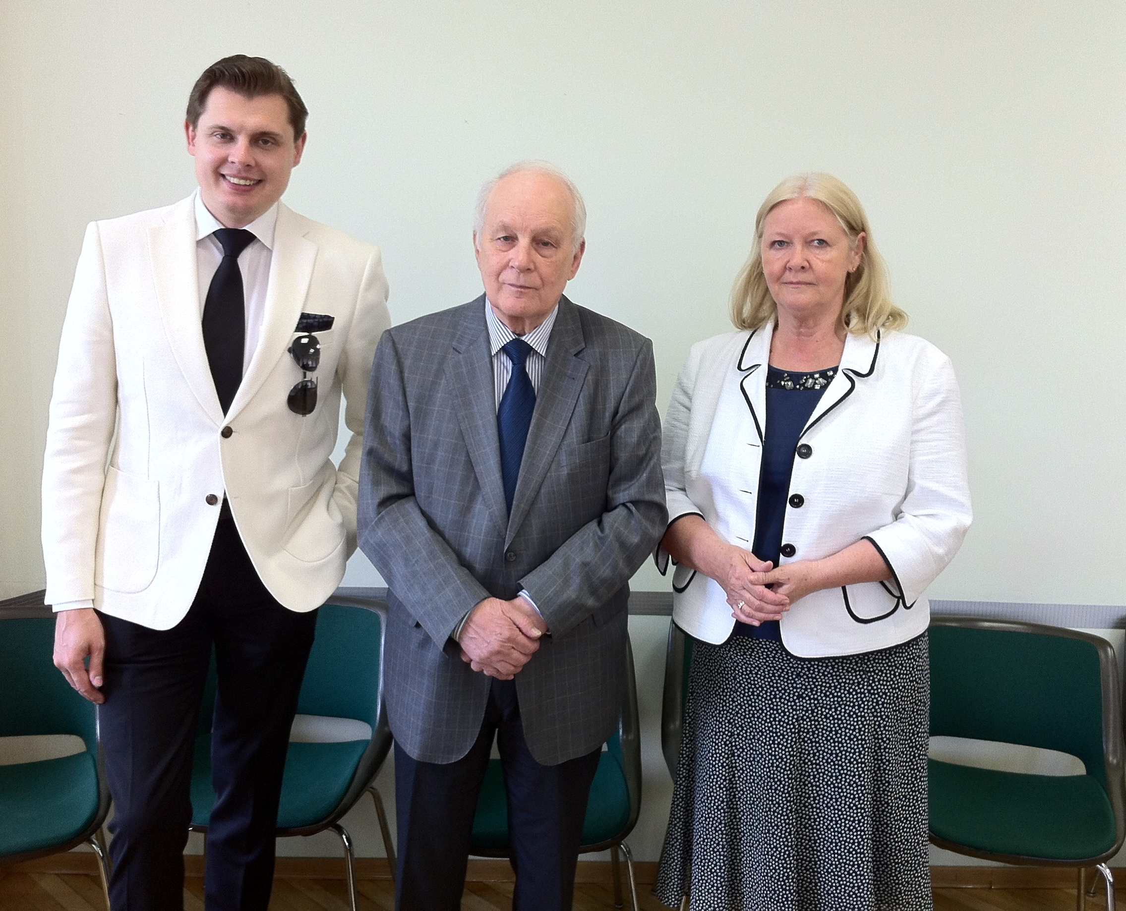 Евгений Николаевич Понасенков и Андрей Николаевич Сахаров